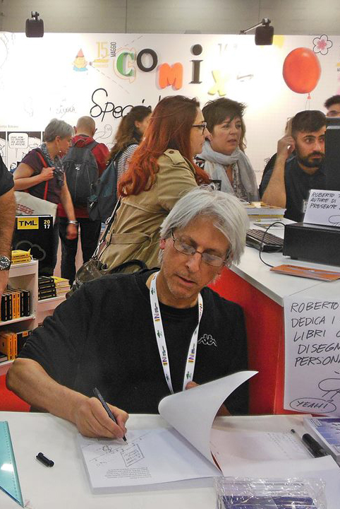 Roberto Totaro mentre disegna alcune dediche ai suoi fans.